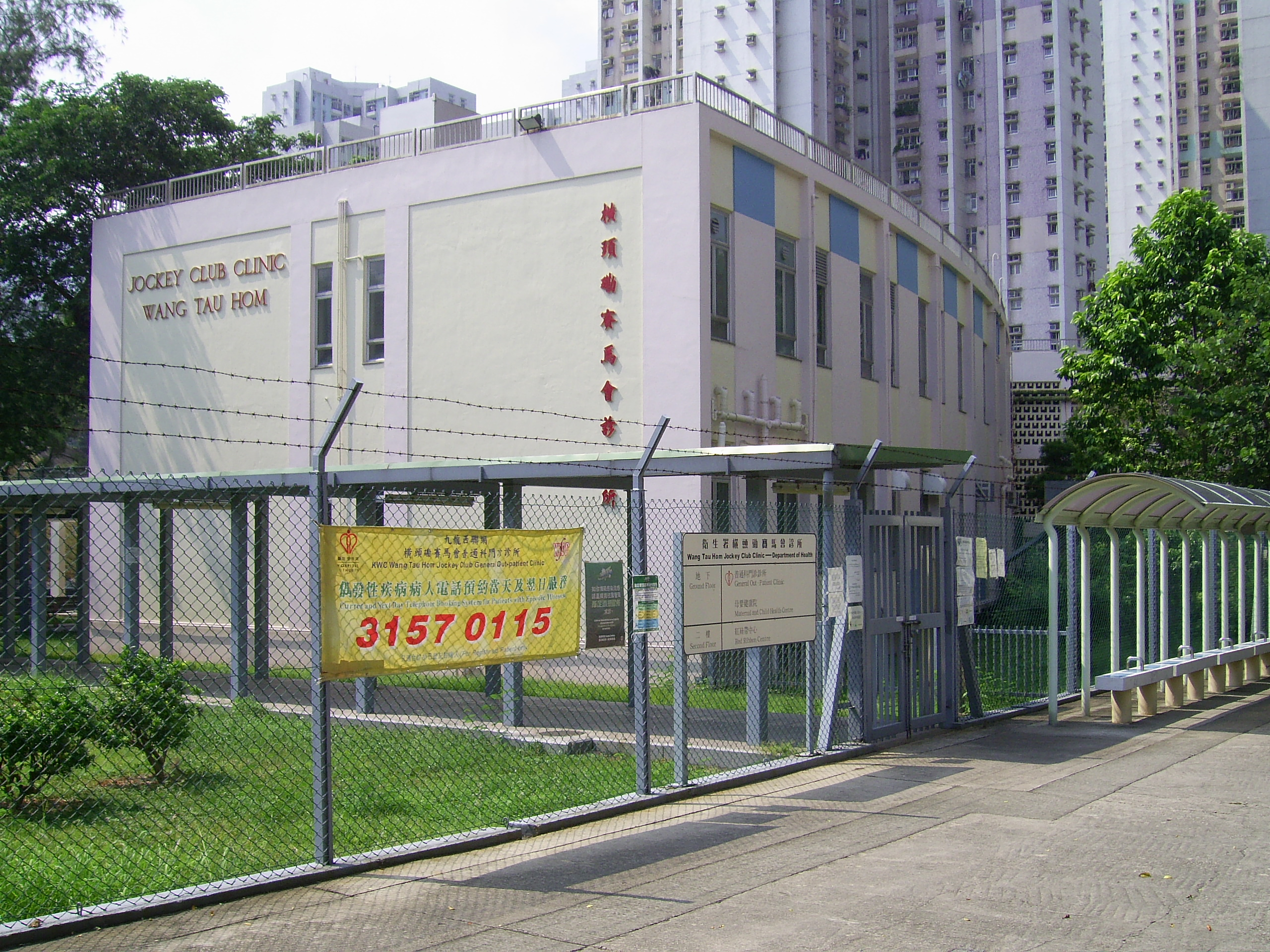 中文（香港）: 橫頭磡賽馬會診所